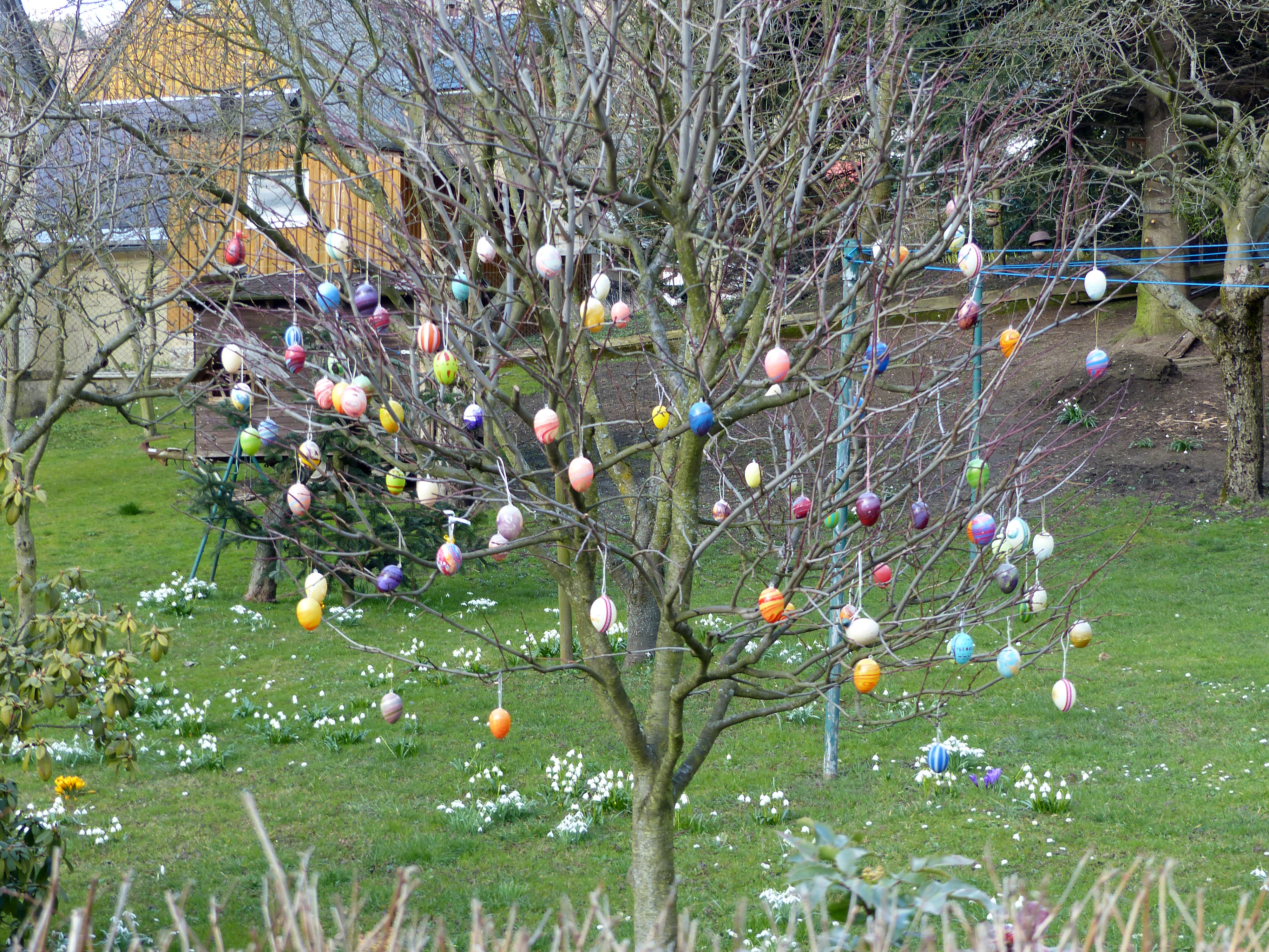 Osterbaum in Saupsdorf (Sebnitz), Sachsen